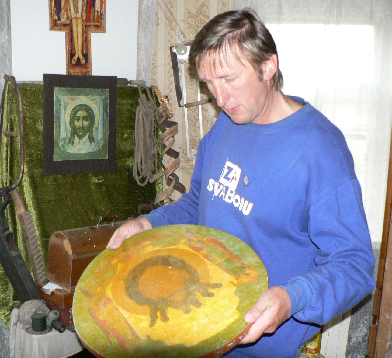 Aleś Puszkin w swojej pracowni w Bobrze